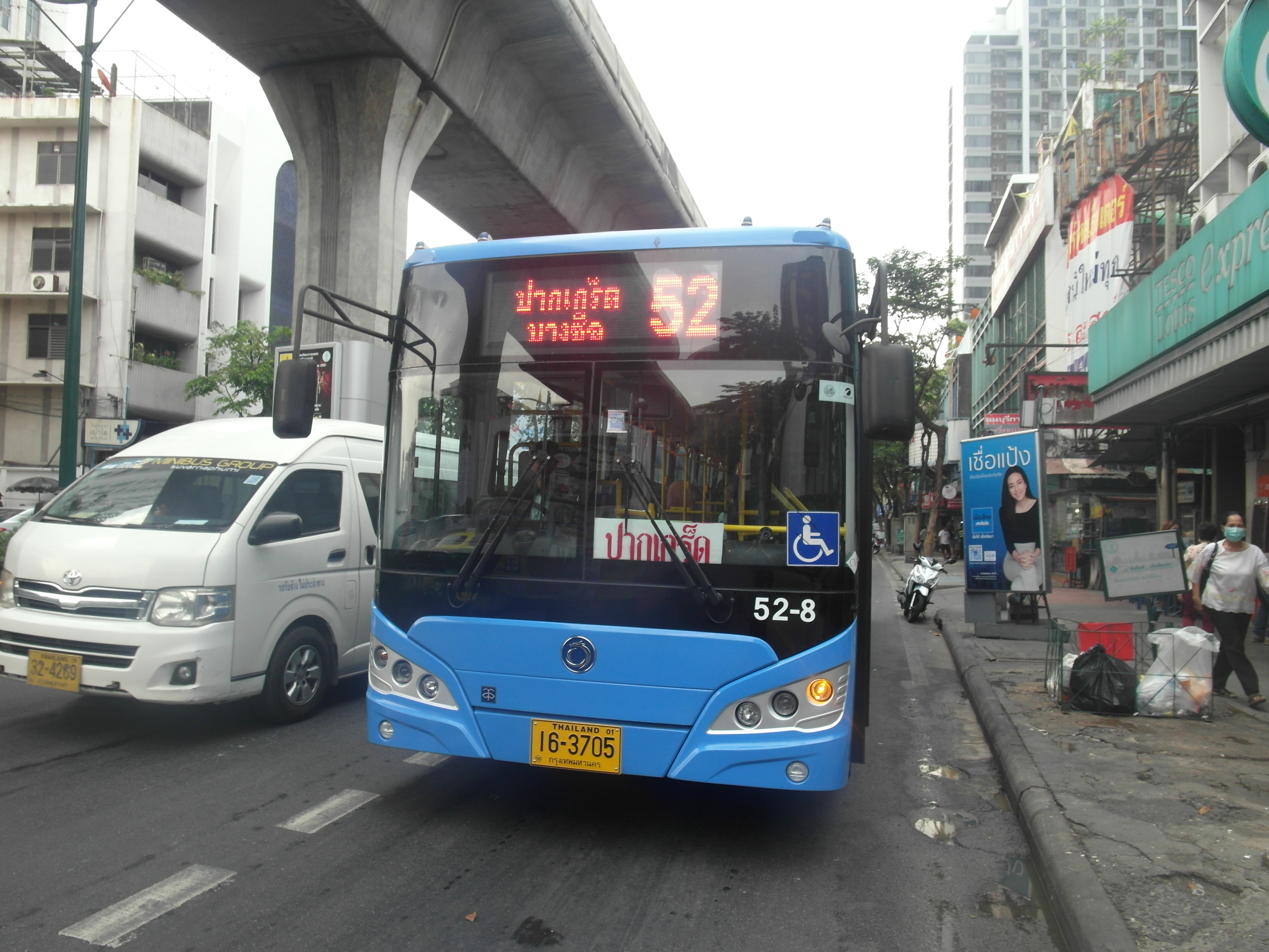 รถเมล์ของบริษัท สมาร์ทบัส จำกัด ในพื้นที่ของกรุงเทพมหานคร และ ปริมณฑล